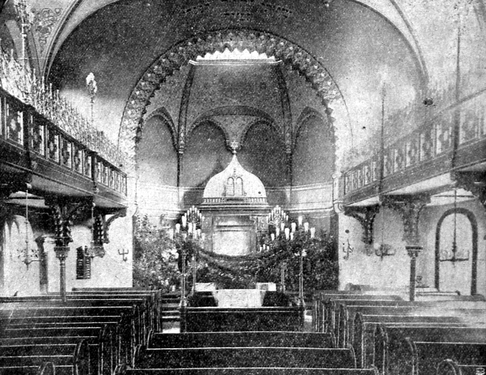 Die Synagoge zu Lübeck, geschmückt aus Anlass des 25jährigen Bestehens.